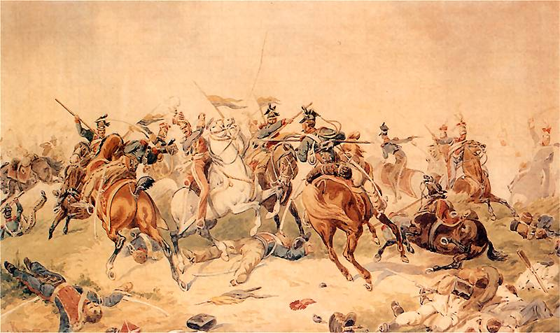 Tomasz Łubieński pod Wagram w roku 1809; akwarela